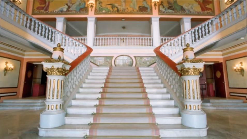 Antigua escalinata del Teatro Victoria Eugenia (San Sebastián, España), antes de las obras acometidas entre 2000 y 2007.